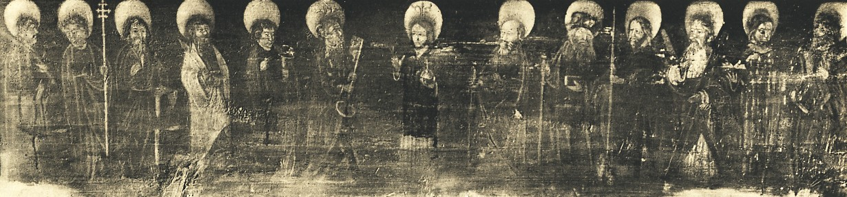 Predella des ersten Altars der Busmannkapelle der Sophienkirche, Temperabemalung, 1945 zerstört